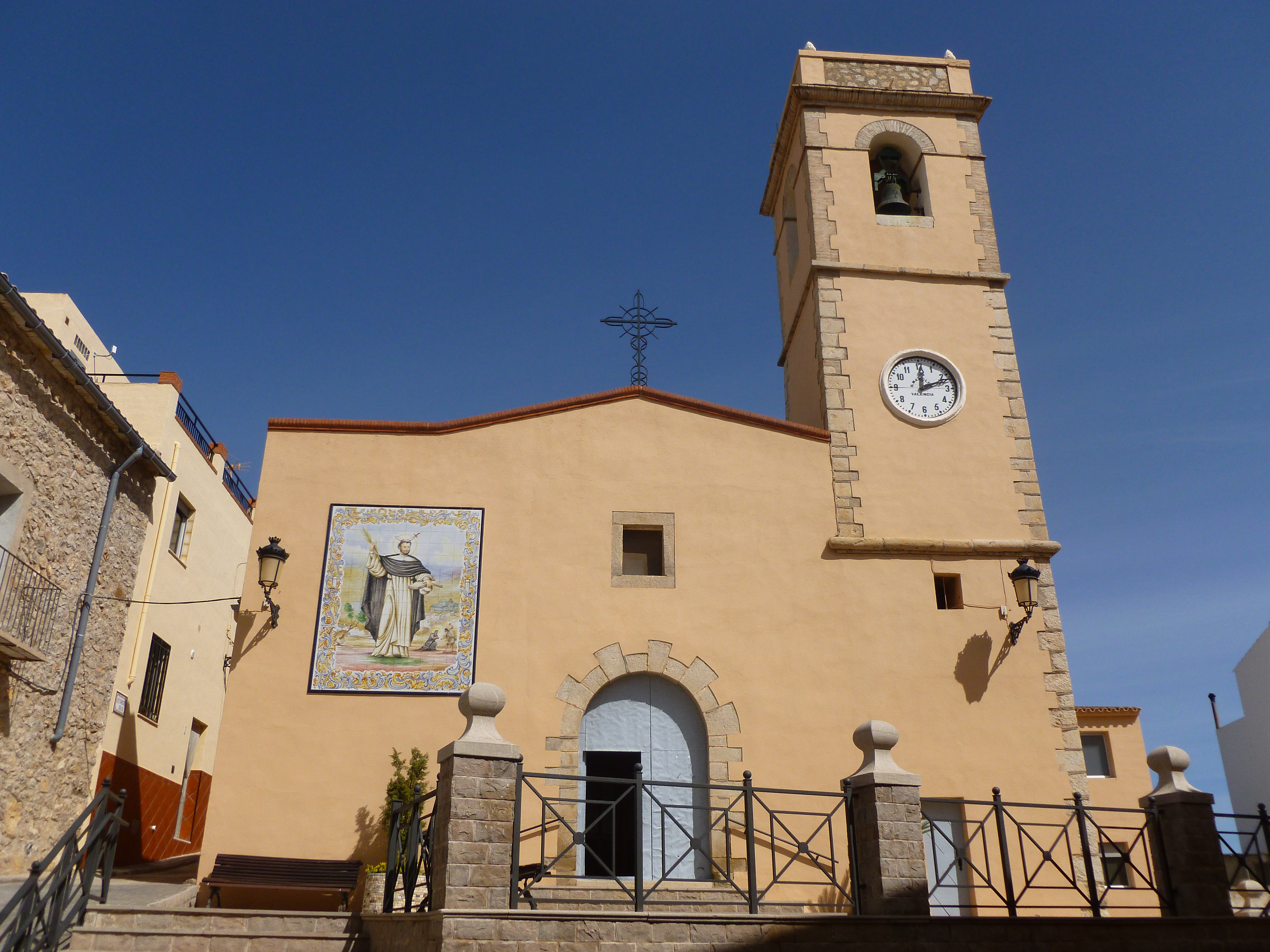 Església de Costur 04.049-001.